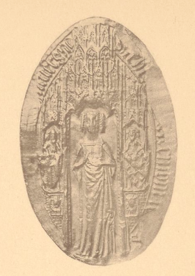 Jeanne de Clermont